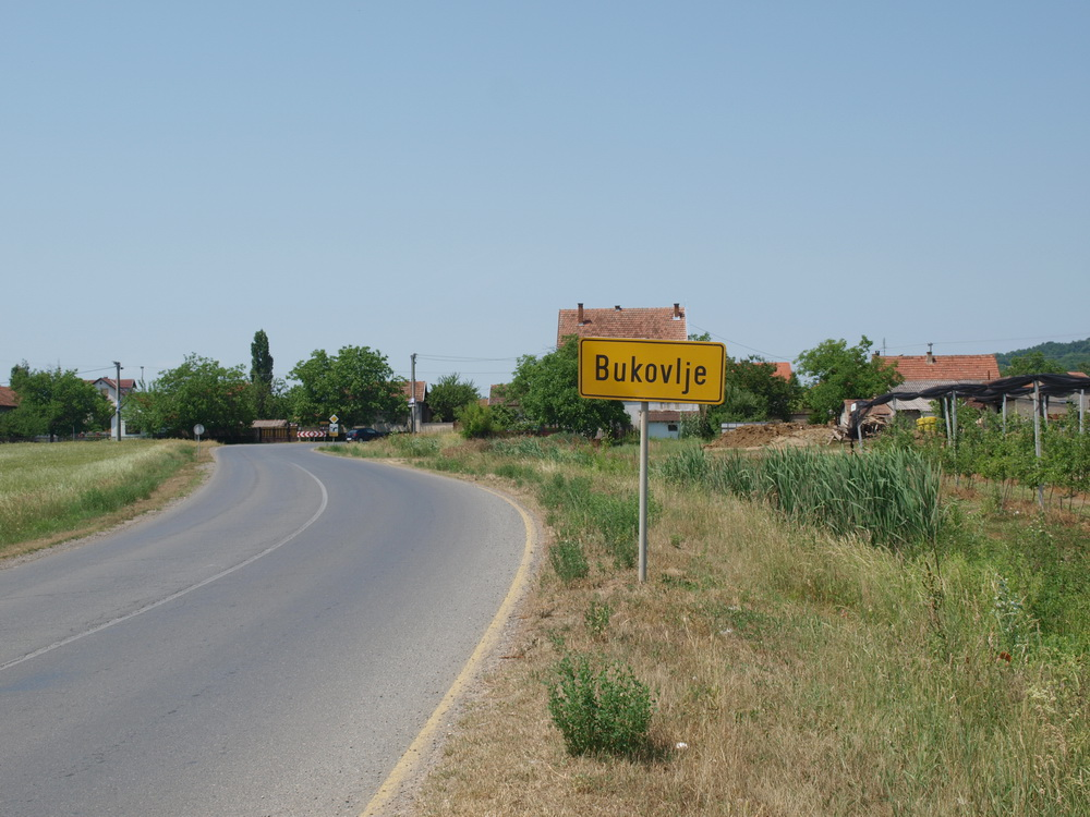 Ulaz u selo Bukovlje, Brodsko-posavska županija.